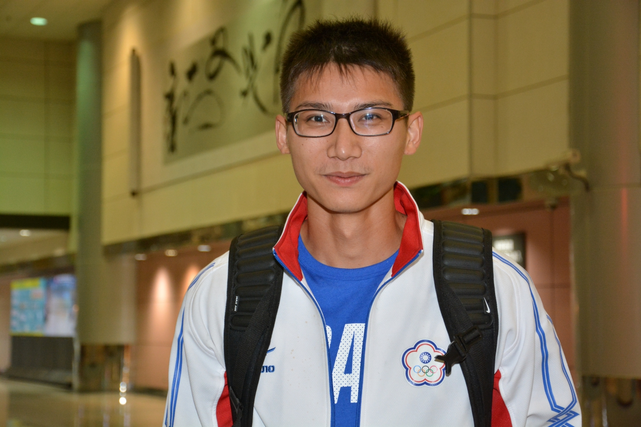 向俊賢HsiangChunHsien